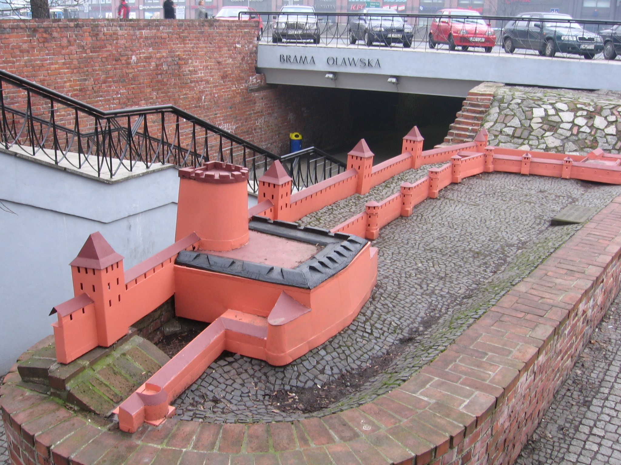 Metallmodell (Maßstab 1:25): "Brama Oławska" (Ohlauer Tor), zeigt einen Abschnitt der Breslauer Stadtbefestigung im Zustand gegen Ende des 16. Jahrhunderts mit der dem Ohlauer Stadttor vorgelagerten Tunneltor-Bastion (1576/77, Bernardo Nurion) an der Unterführung der promenada Staromiejska (Altstadtpromenade) unter der ul. Oławska (Ohlauer Strasse), Wrocław (Breslau), Niederschlesien, Polen.